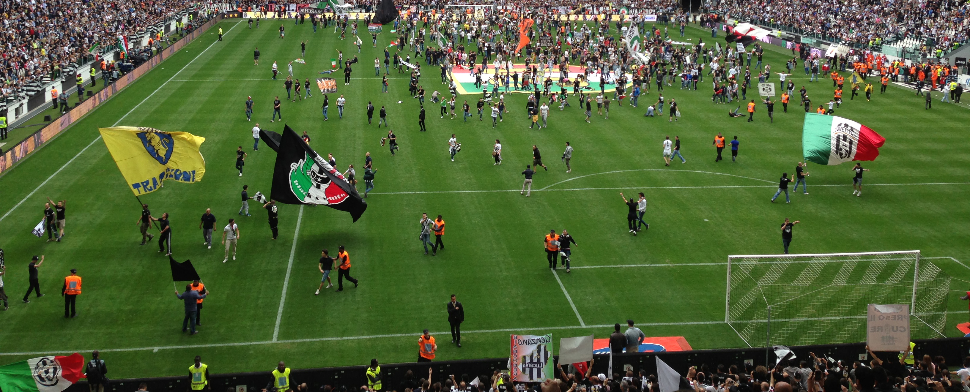 Torino, Juventus Stadium, 5 maggio 2013. La festa dei tifosi bianconeri per la vittoria della Juventus FC nel campionato di Serie A 2012-13.